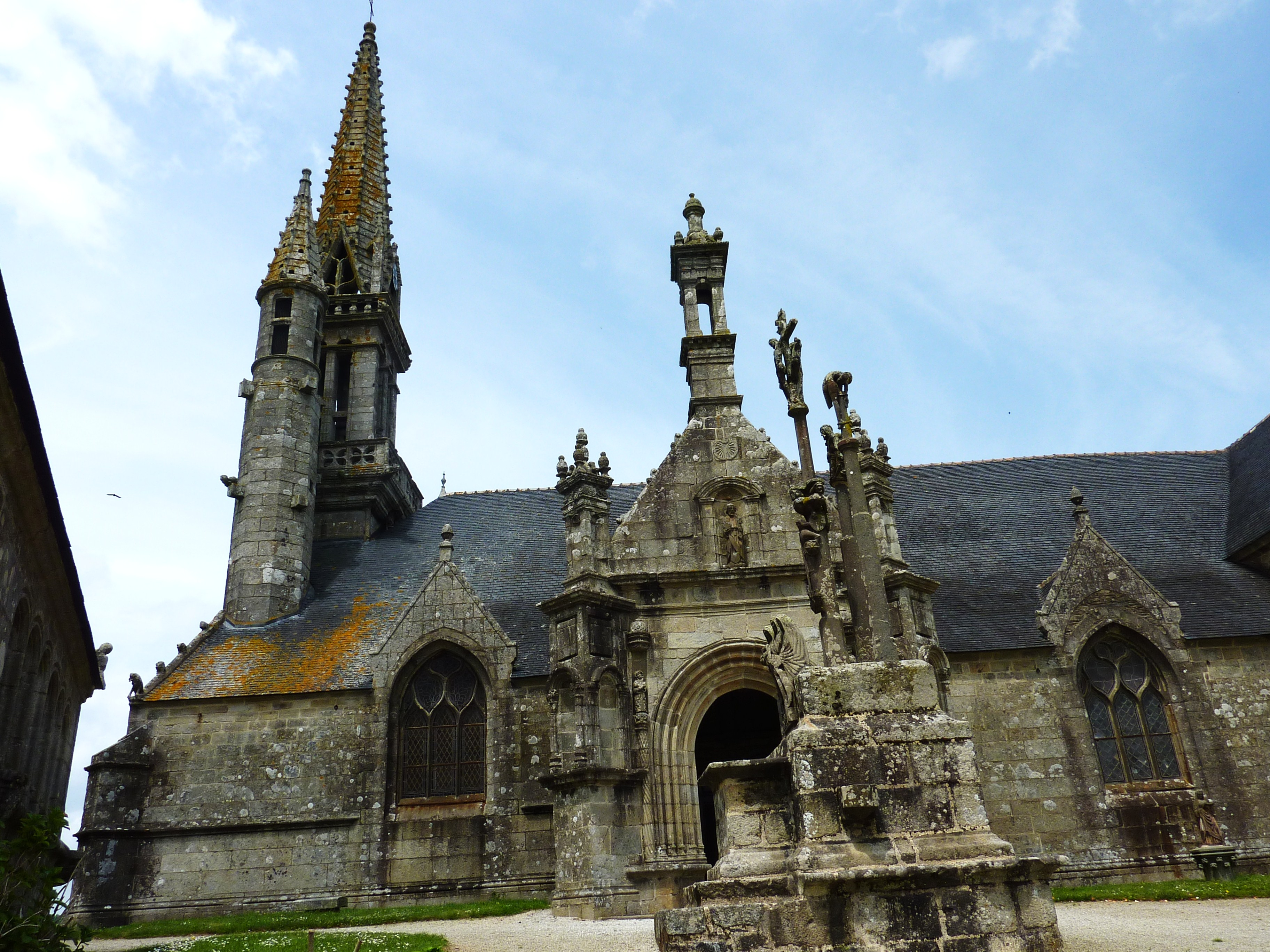 Enclos paroissial de Brasparts: le calvaire et l'église Notre-Dame-et-Saint-Tugen